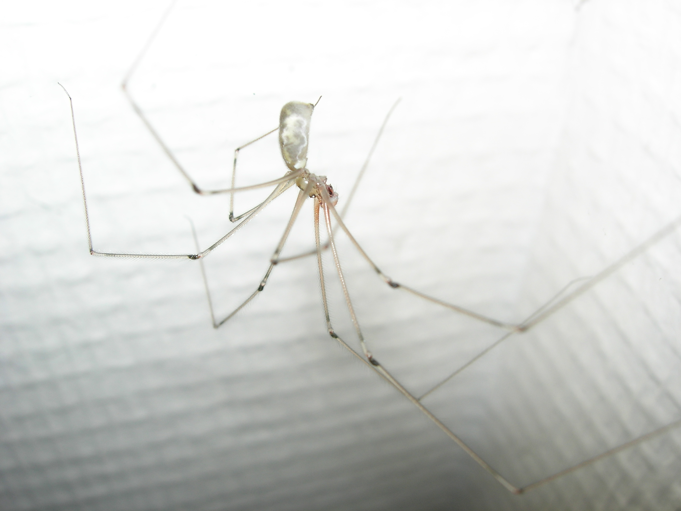 Araignée sur un mur Pholcus phalangioides